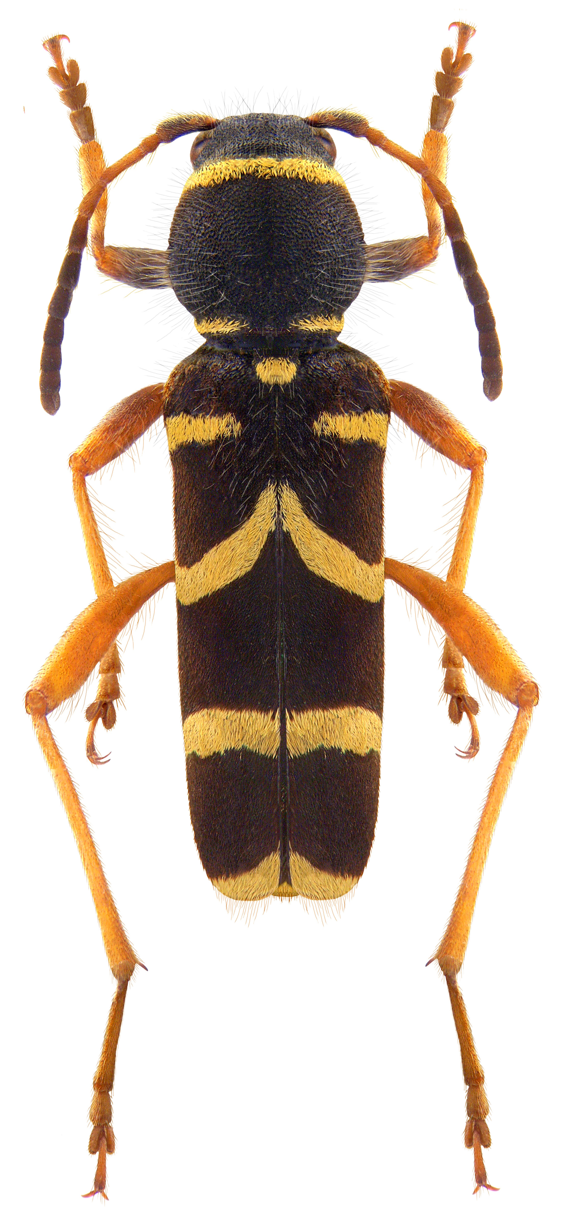 Familie: Cerambycidae Groesse: 7-14 mm Verbreitung: Europa Ökologie: Entwicklung in Laubbäumen, besonders in Buche Fundort: Germania, Bayern, Oberfranken, Pottenstein leg.det. U.Schmidt, 1995 Photo: U.Schmidt, 2009